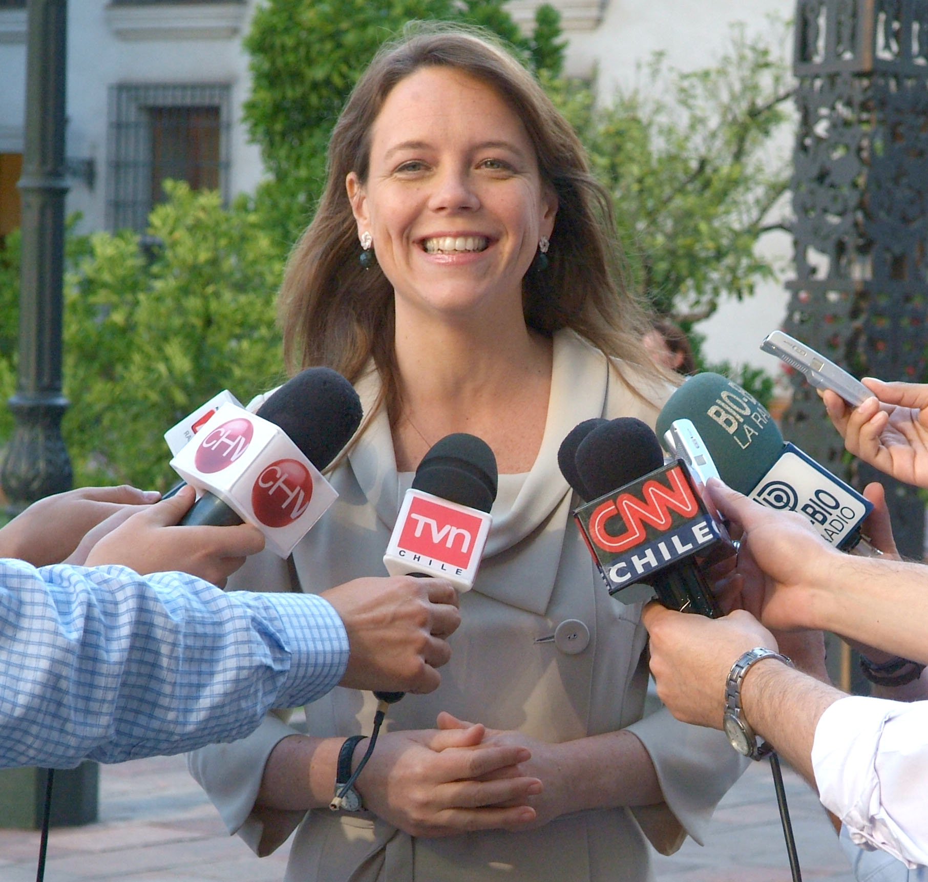 Ministra Secretaria General de Gobierno, Ena von Baer. Palacio de la Moneda.